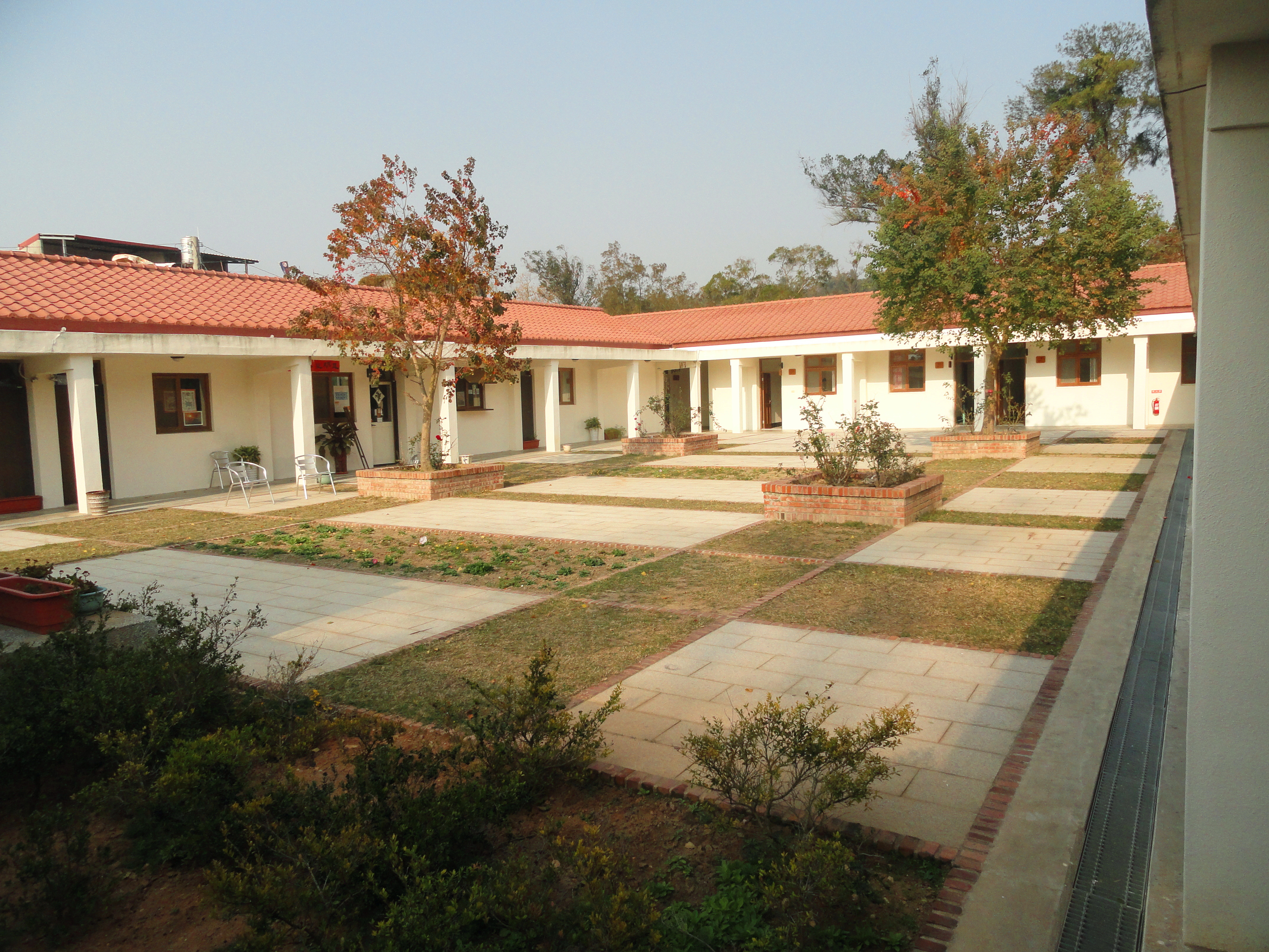 中文（台灣）: 位於金門縣金湖鎮的特約茶室展示館內部中文（中国大陆）: 位于金门县金湖镇的特约茶室展示馆内部